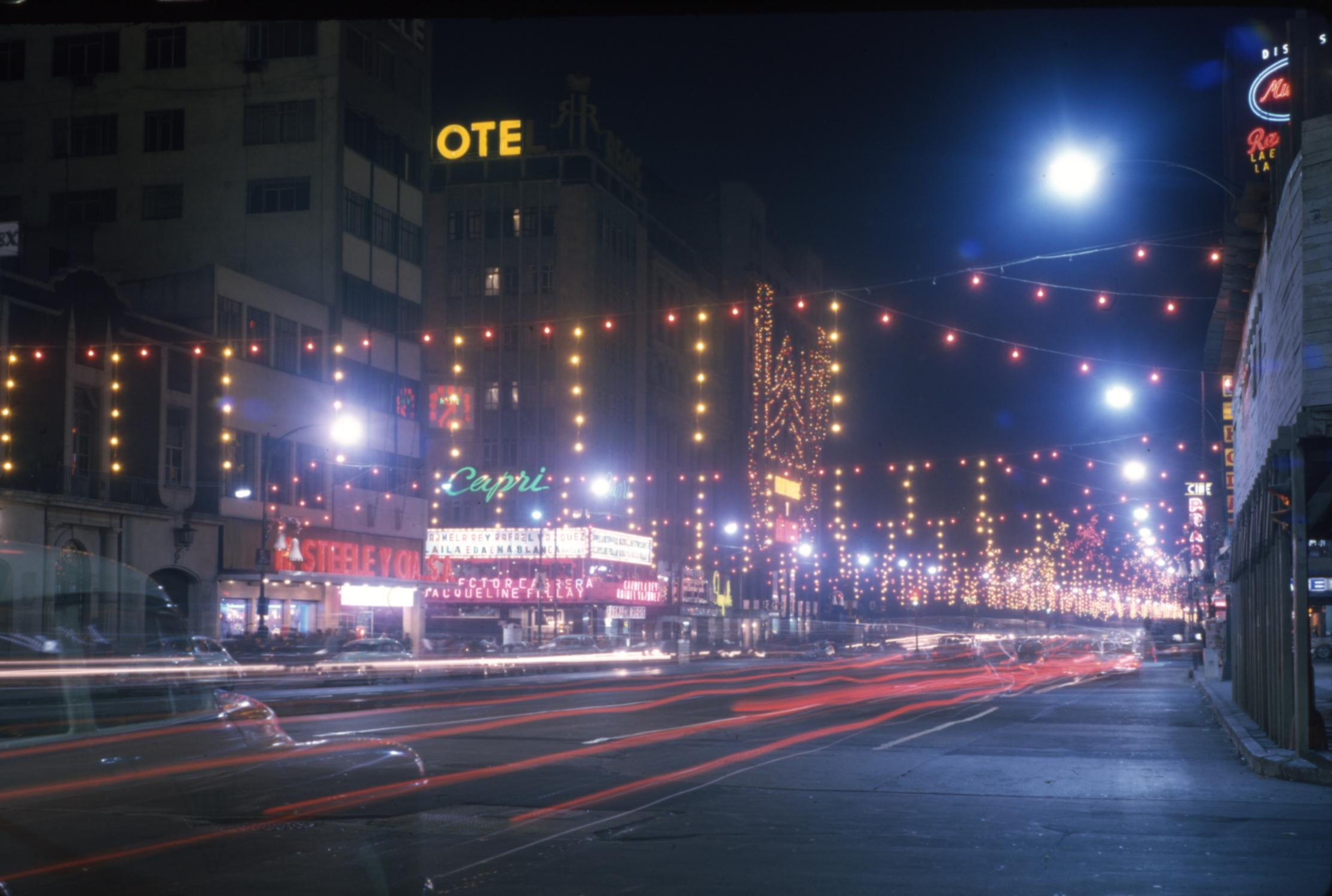 Fotografía antigua de la Ciudad de México resguardadas por el Museo Archivo de la Fotografía (MAF) de la Ciudad de México.